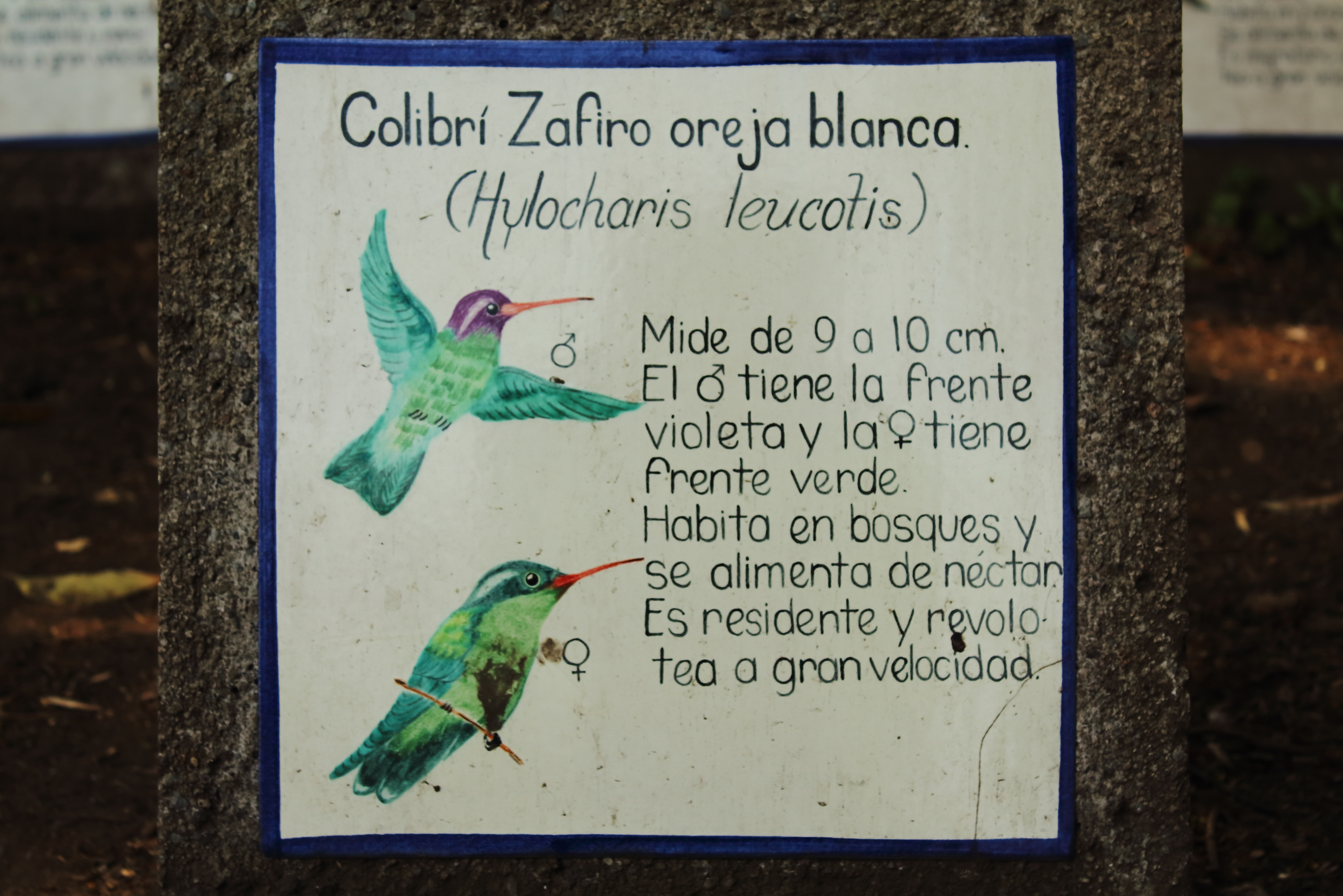 Breve descripción sobre el Hylocharis leucotis en el jardín botánico de la UNAM, México.